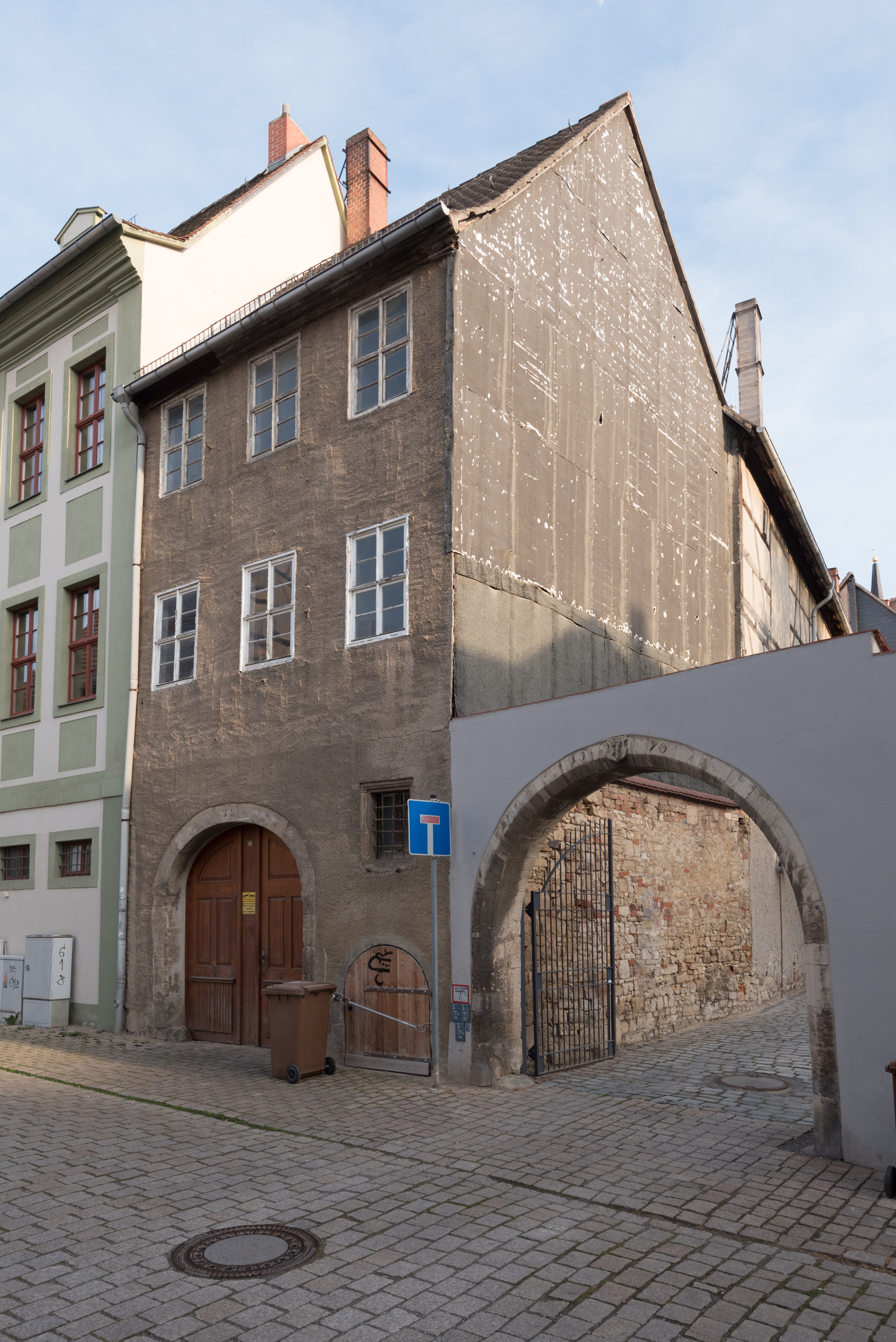 Naumburg (Saale), Mariengasse 13, 12